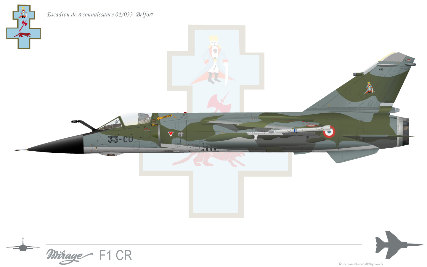 Mirage F1 CR escadron Belfort